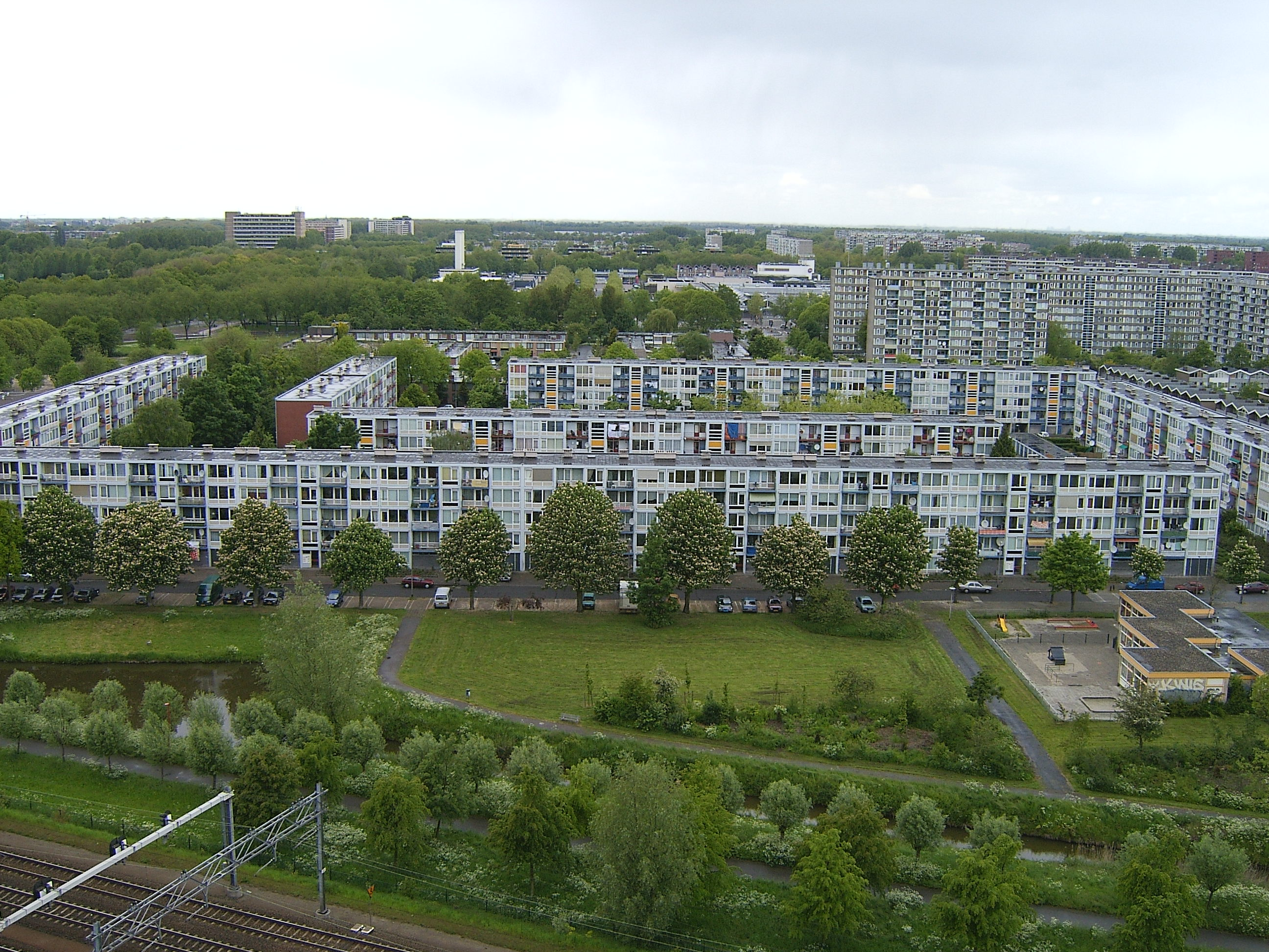 Overvecht Zuid: Overvecht Spoorzone